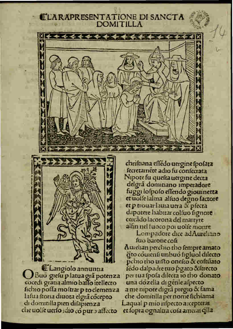 Rappresentazione di Santa Domitilla. - [Firenze] : [Antonio Miscomini], [circa 1495]. - 6 c. ; a⁶ ; 4º.